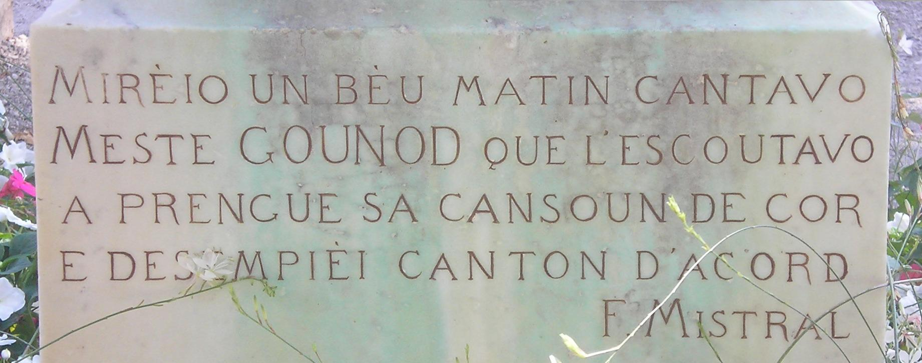 Vers referent a Mirèio, de Frederic Mistral en una estàtua a Charles Gounod a Sant Romieg de Provença (Saint-Rémy-de-Provence)